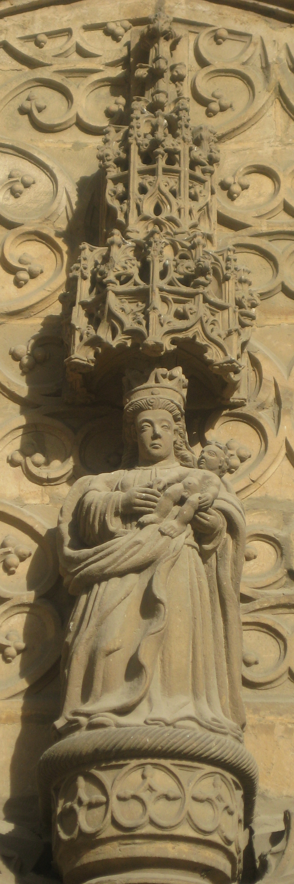 Estatua de Santa María con niño en el tímpano de la Portada del Sol de la Iglesia de Santa María de Güeñes.